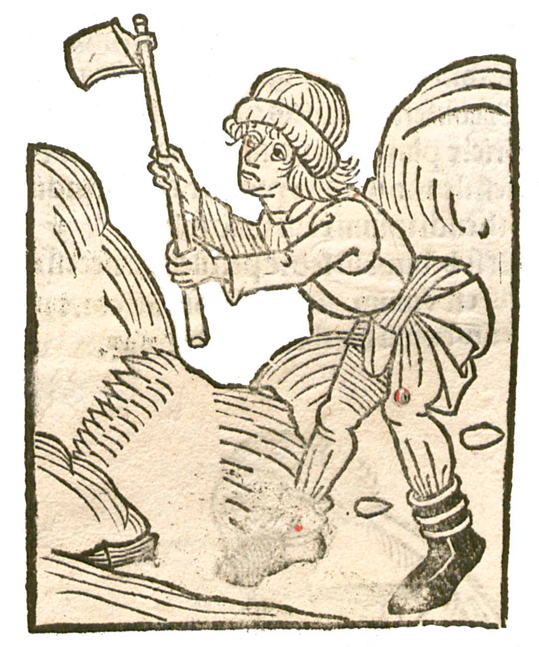 Abbildung zum Kapitel Bolus armenus